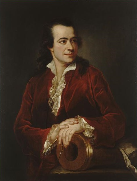 Huile sur toile - 97 x 74,5 cm Paris, Musée de l’Armée Photo : RMN-GP/P. Segrette